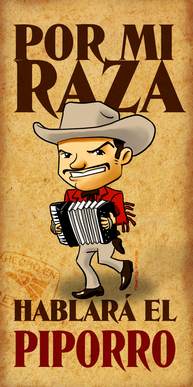 Caricatura de El piporro parodiando la famosa frase de José Vasconcelos